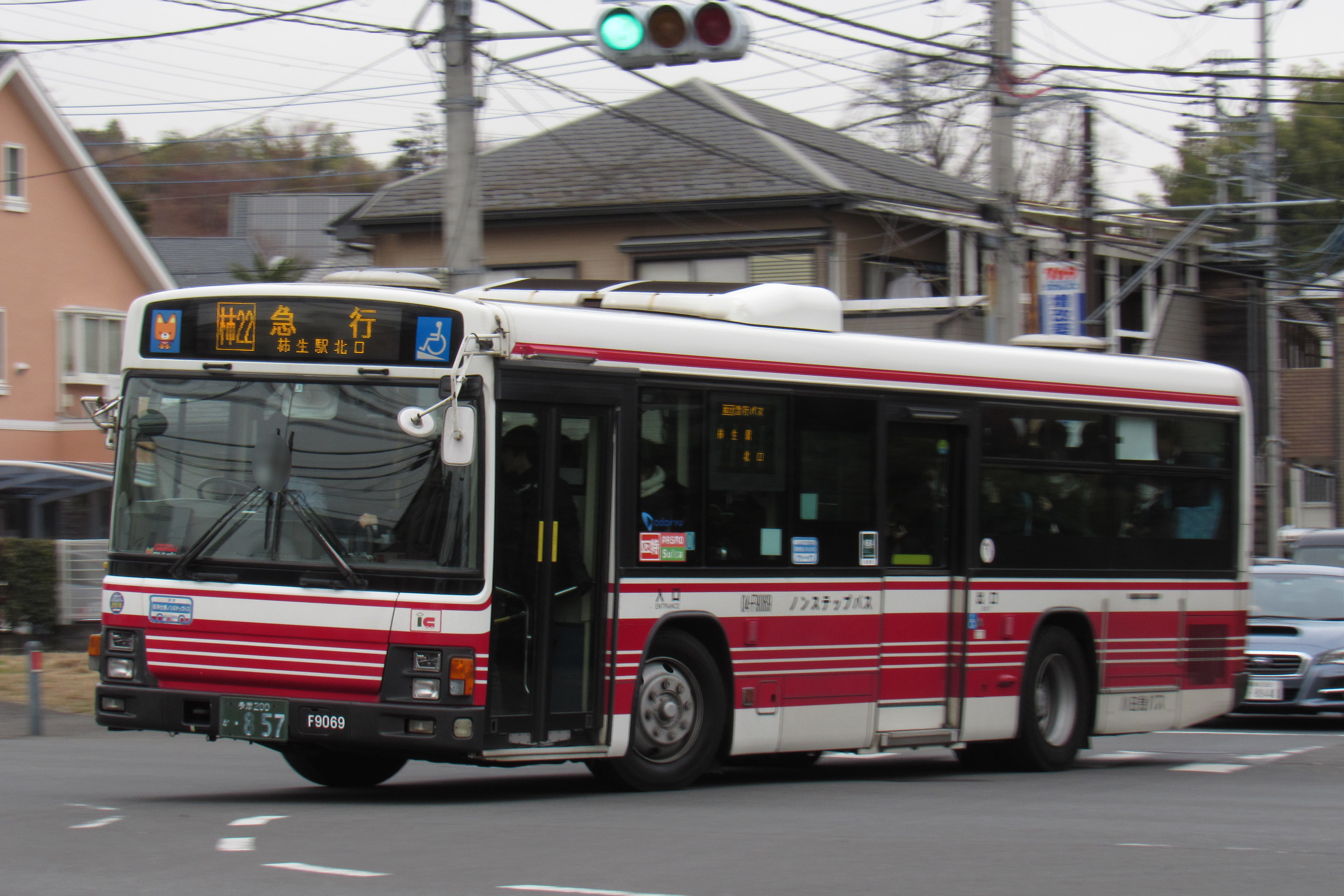 小田急バス柿22系統急行便